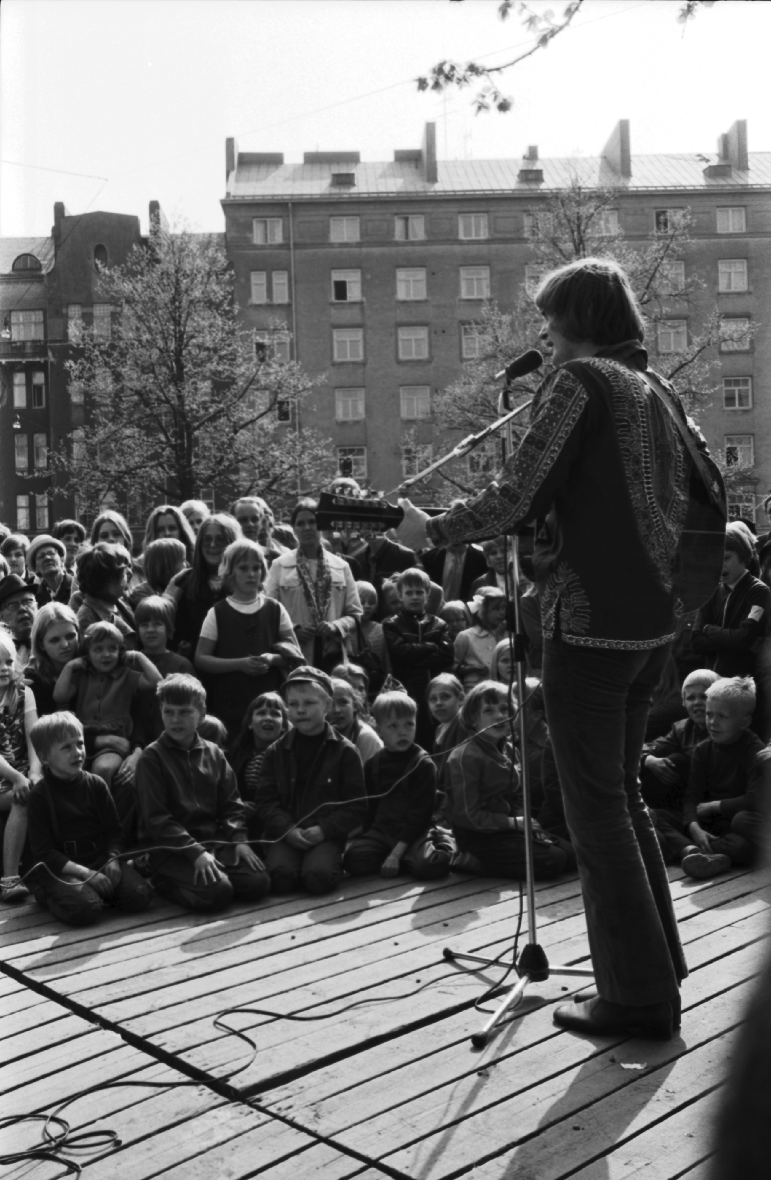 Muusikko Jukka Kuoppamäki esiintymässä runsaslukuiselle yleisölle Karhupuistossa puistotapahtuman aikaan.